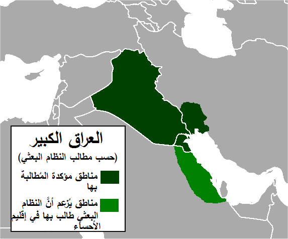 العراق الكبير كما رآه مُنظروا حزب البعث العراقي، وبالأخص خلال عهد الرئيس الأسبق صدَّام حُسين. المناطق الخضراء الداكنة هي تلك البُلدان أو الأقاليم التي يُؤكَّد مُطالبة النظام البعثي بها نظرًا لاعتبارها جُزءًا من إقليم العراق التاريخي، وهي تضم إلى جانب الجُمهوريَّة العراقيَّة كُللًا من دولة الكُويت ومُحافظة خوزستان الإيرانيَّة ذات الغالبيَّة العربيَّة. أمَّا المنطقة الخضراء الفاتحة فتُظهر ما يُزعم أنَّ البعث العراقي يُطالب بها، وهي منطقة الأحساء في السُعوديَّة، التي قيل بأنَّ العراق حاول ضمَّها أبَّان غزو الكُويت، إذ حرَّك دبَّاباته نحو الحُدود السُعوديَّة، وذلك للحُصول على آبار النفط العديدة في تلك المنطقة. ومن المُنظرين من قال بأنَّ العراق البعثي كان يُطالب بالأحساء كونها كانت في العهد العُثماني تُشكِّل جُزءًا من ولاية البصرة.